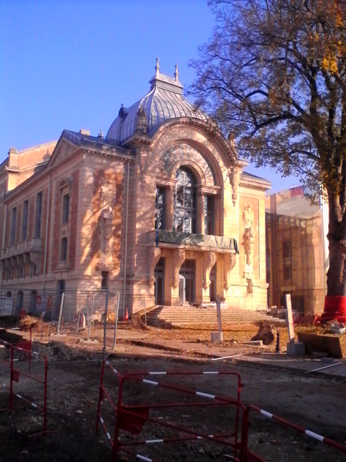 Theatre d'Evreux sous le soleil d'Automne à Midi